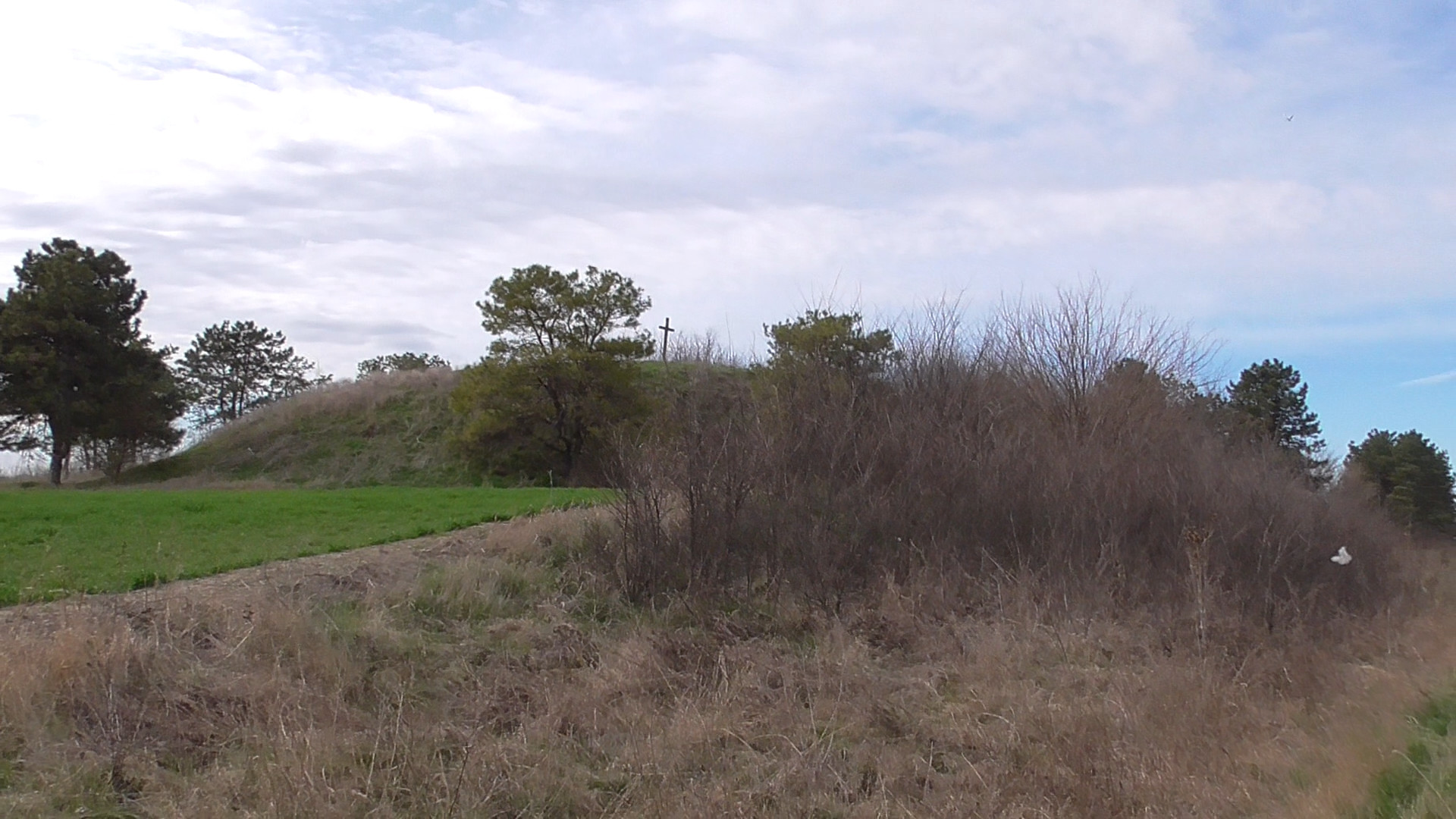 A bácsföldvári Csonthalom